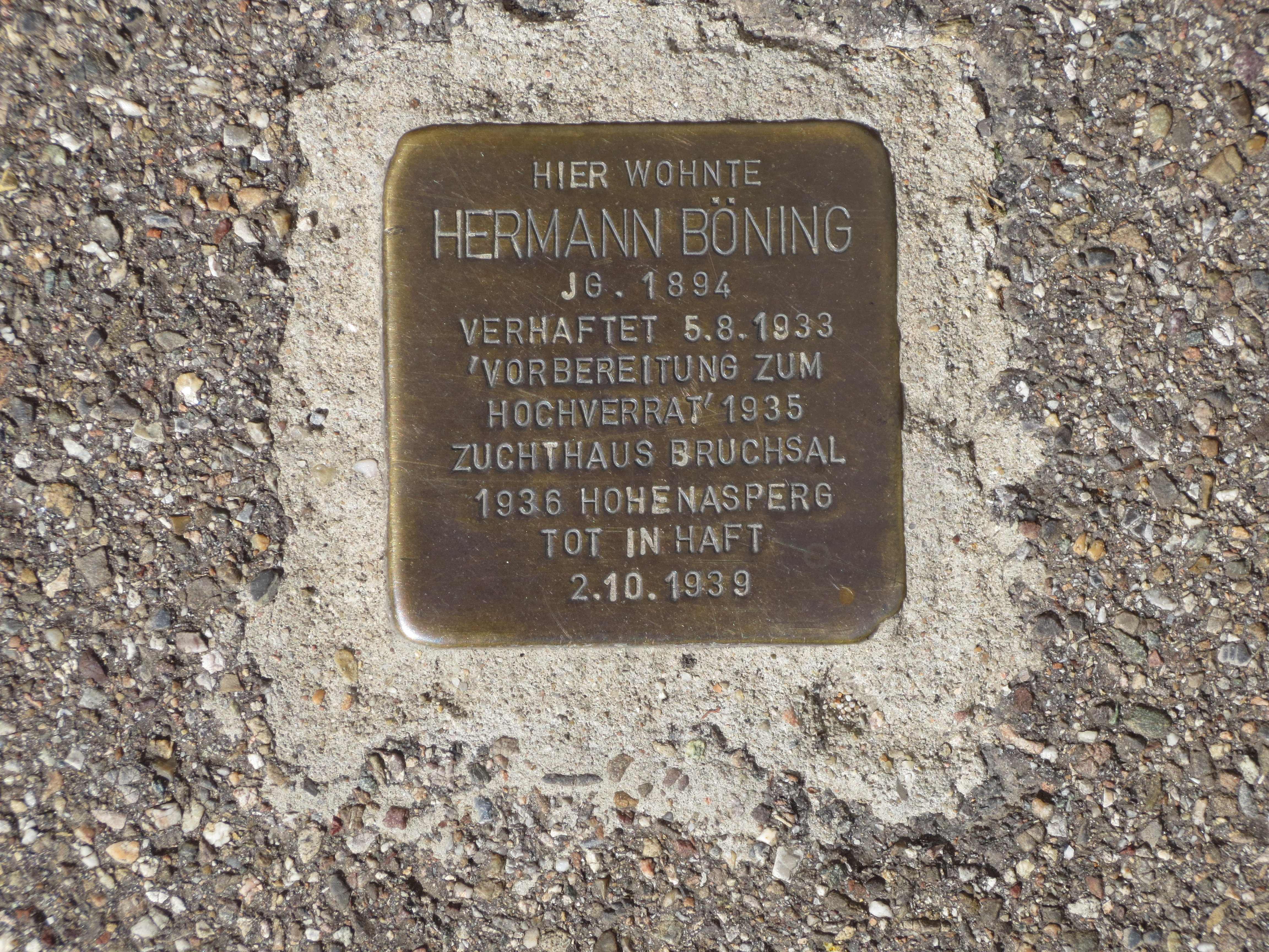 Stolperstein zum Gedenken an Hermann Böning in Heidelberg